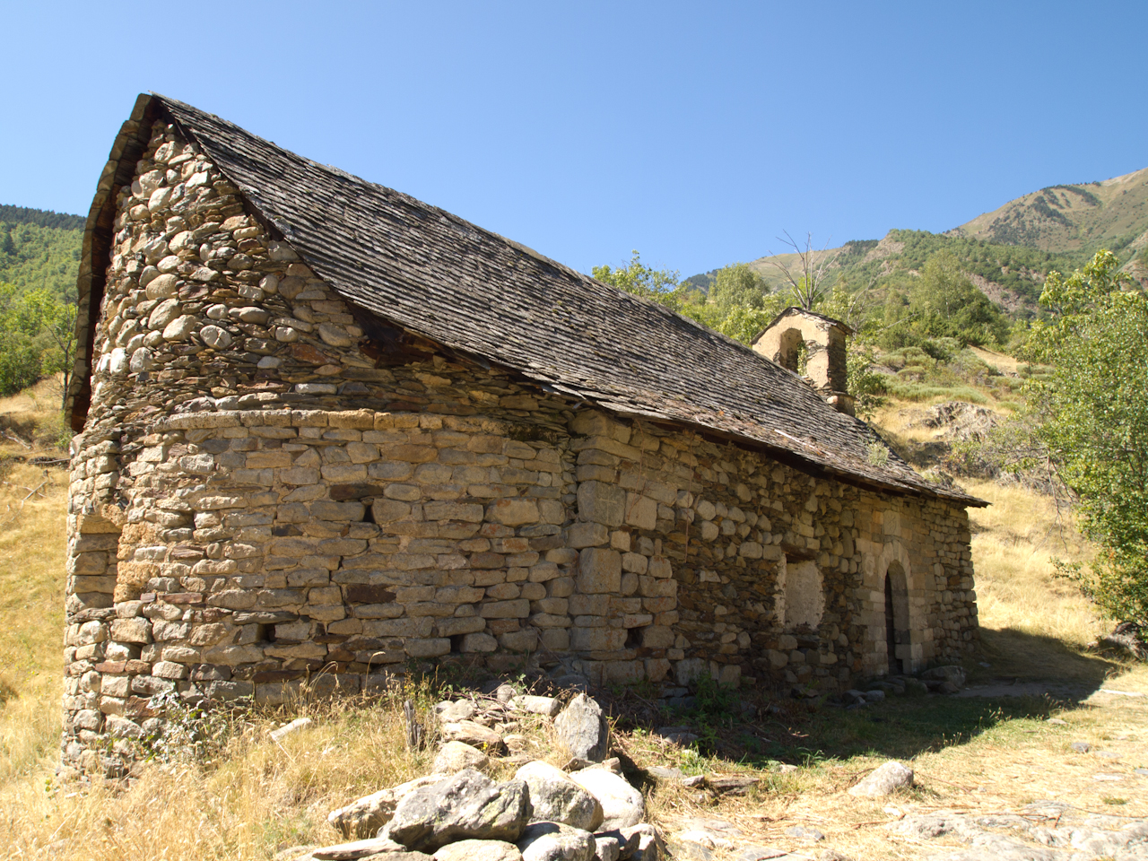 Fotografia de la capella de la Mare de Déu de les Neus